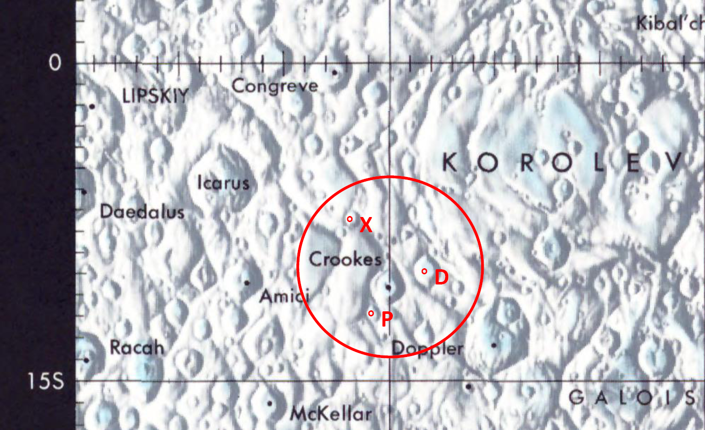 Moon Map - Equatorial region 45S to 45N - LPC1 - NASA-Crookes